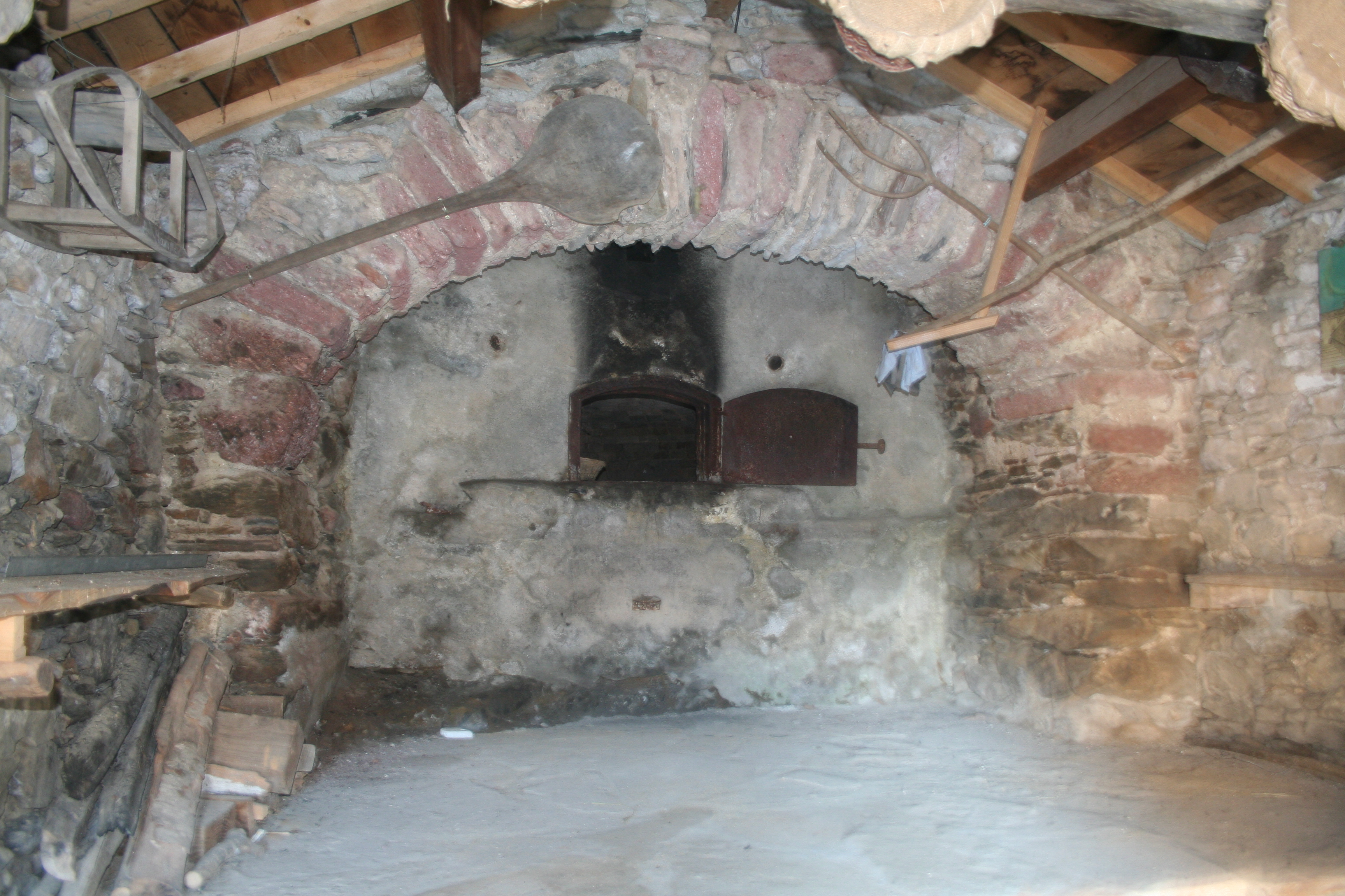 Barre (Tarn) - four banal de Gos.